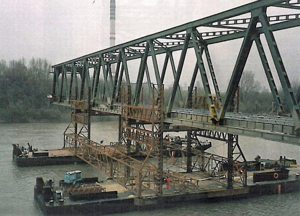 A bárkákon Cigánd felé úszó rácsos hídszerkezet a Tiszán, háttérben a AES-Tiszai Erőmű 250 méter magas kéménye